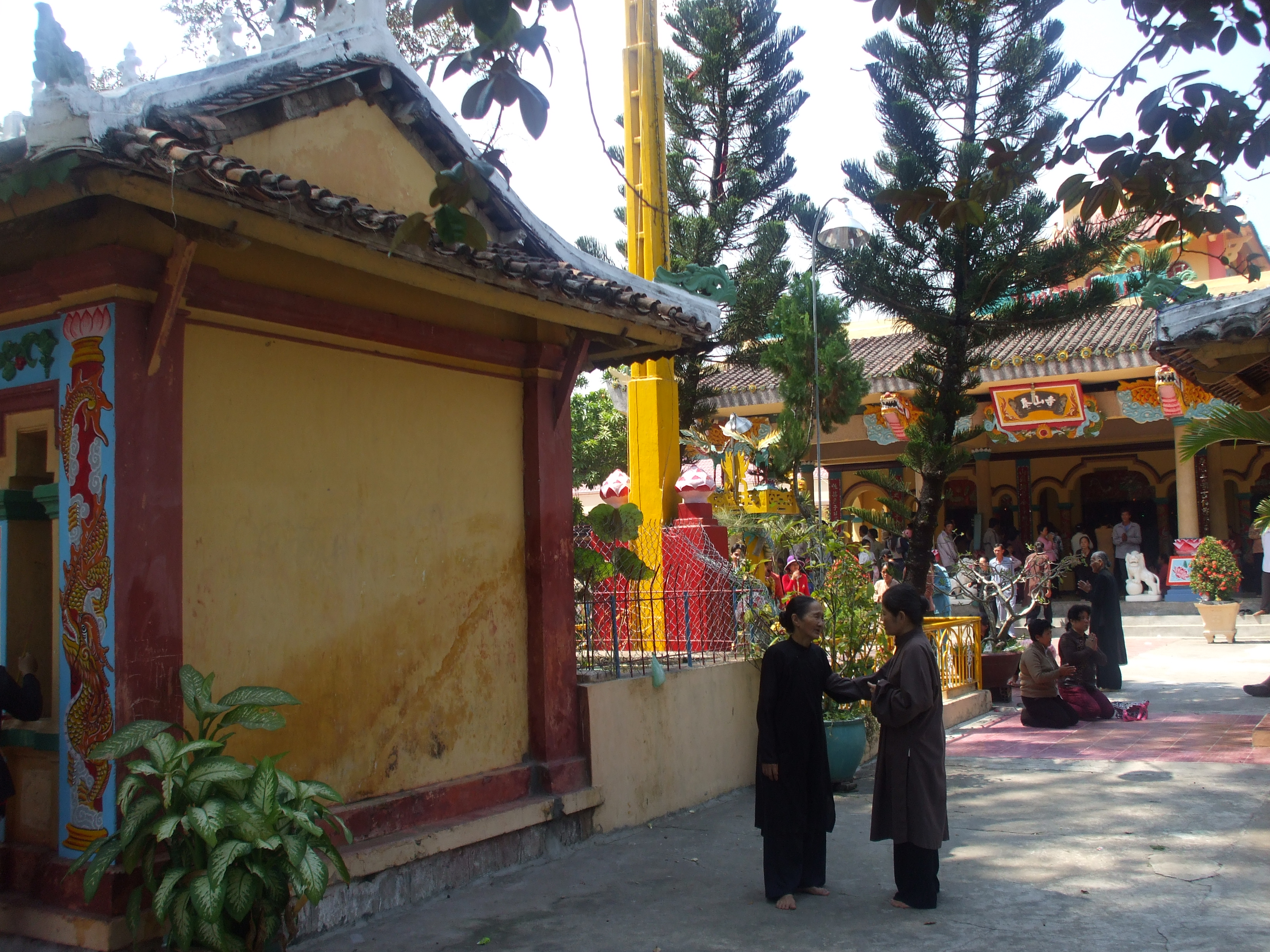 Chùa Thới Sơn (An Giang). Ảnh minh họa cho lối kiến trúc " trước miễu, sau chùa". Kèm theo là bộ trang phục của người theo đạo Bửu Sơn Kỳ Hương, đạo Hiếu Nghĩa và đạo Phật giáo Hòa Hảo.